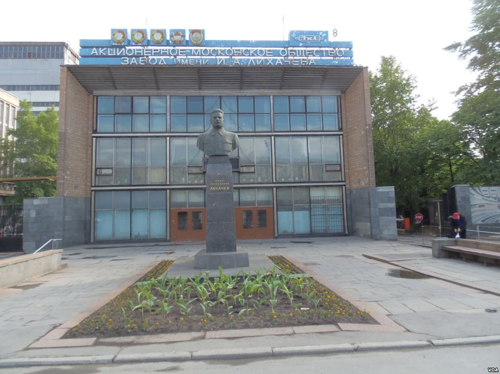 中文（中国大陆）: 莫斯科利哈乔夫汽车厂